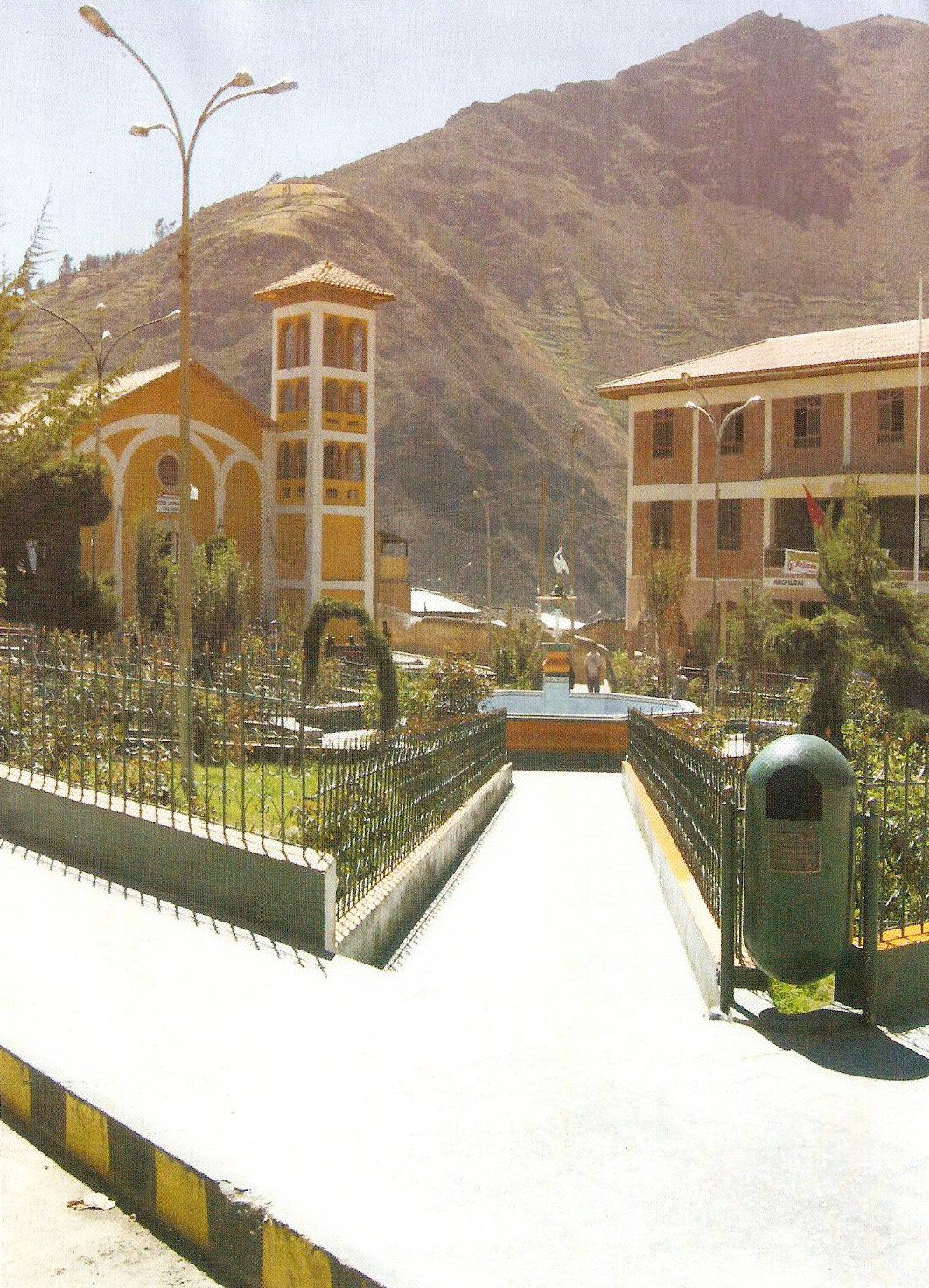 La Plaza de Armas de la ciudad de Ocros